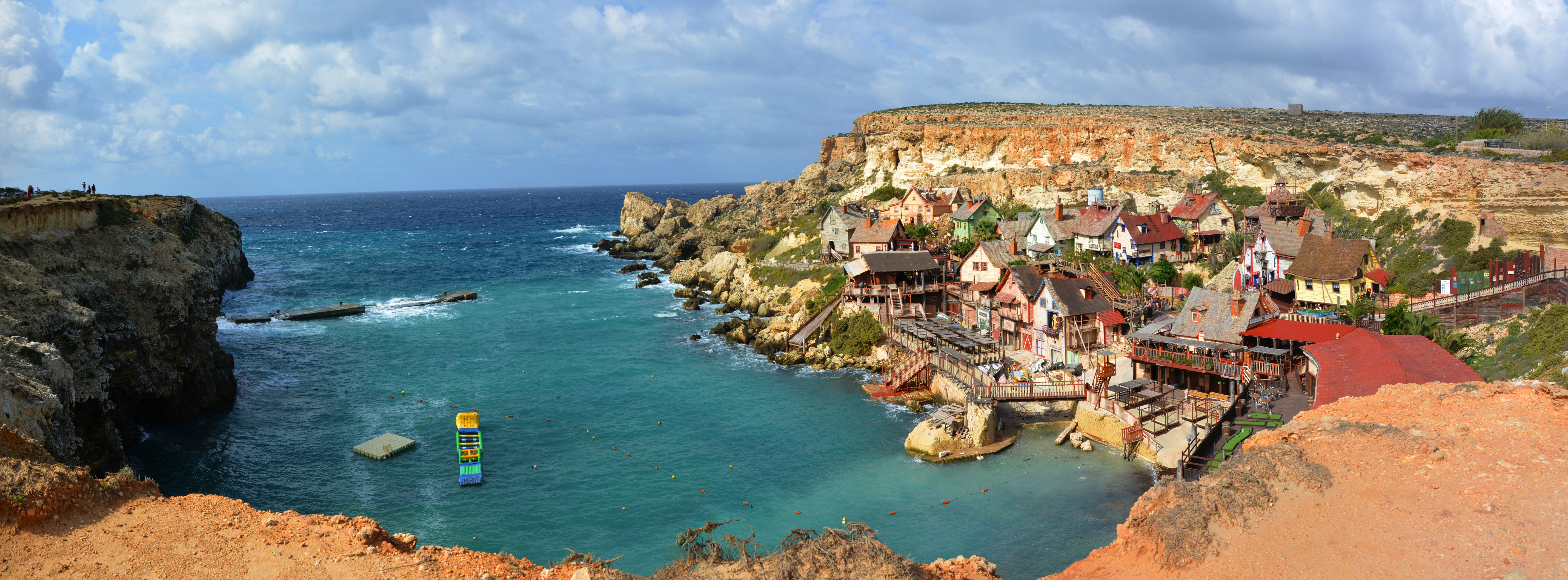 Vue panoramique d'Anchor Bay et du Popeye Village, Malte